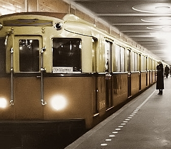 Вагон типа Б на станции Красносельская Московского метро